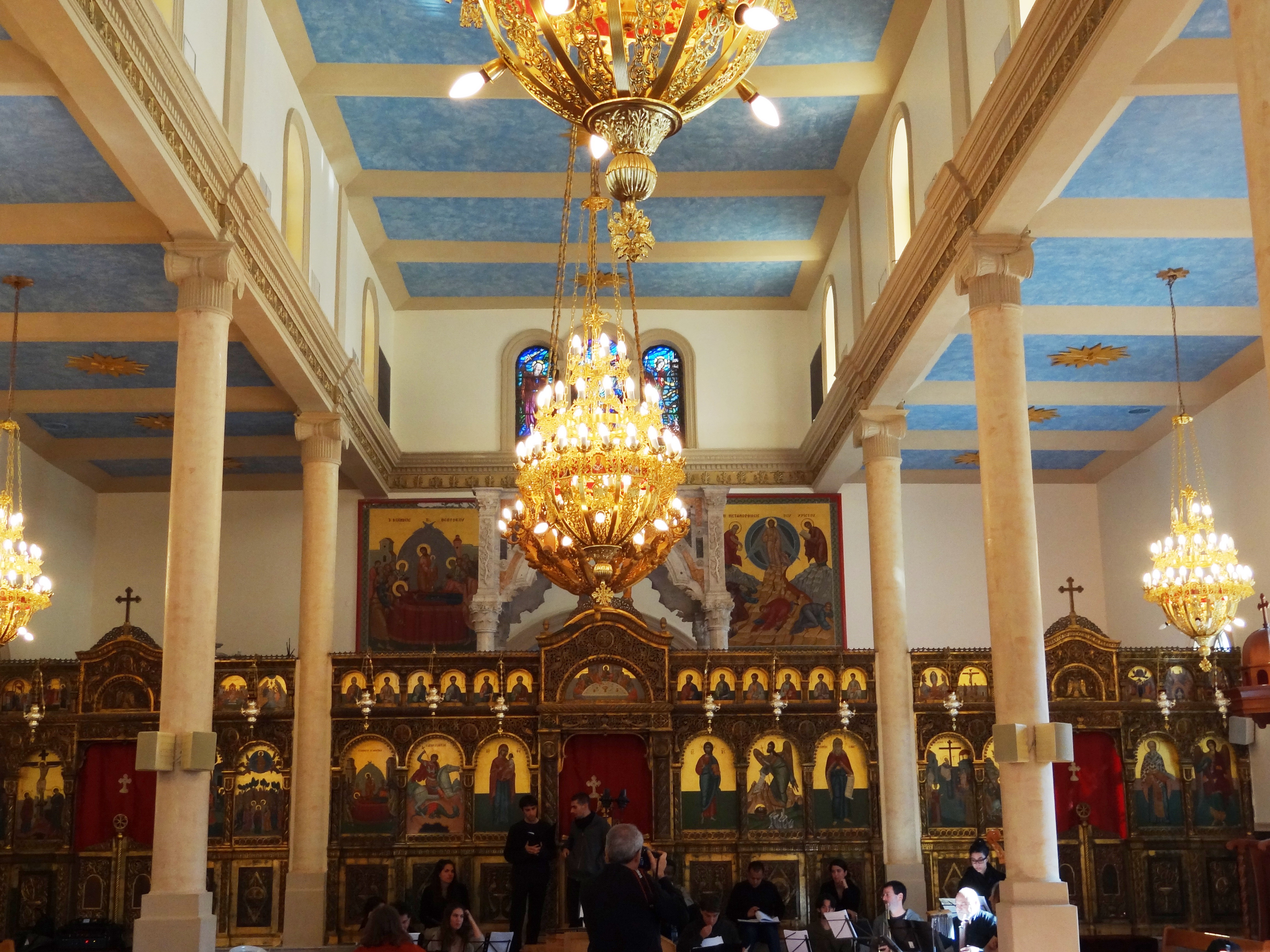 St. Elias Cathedral of the Melkite Catholic Haifa Israel קתדרלת אליהו הנביא של הכנסייה המלכיתית היוונית-קתולית בחיפה